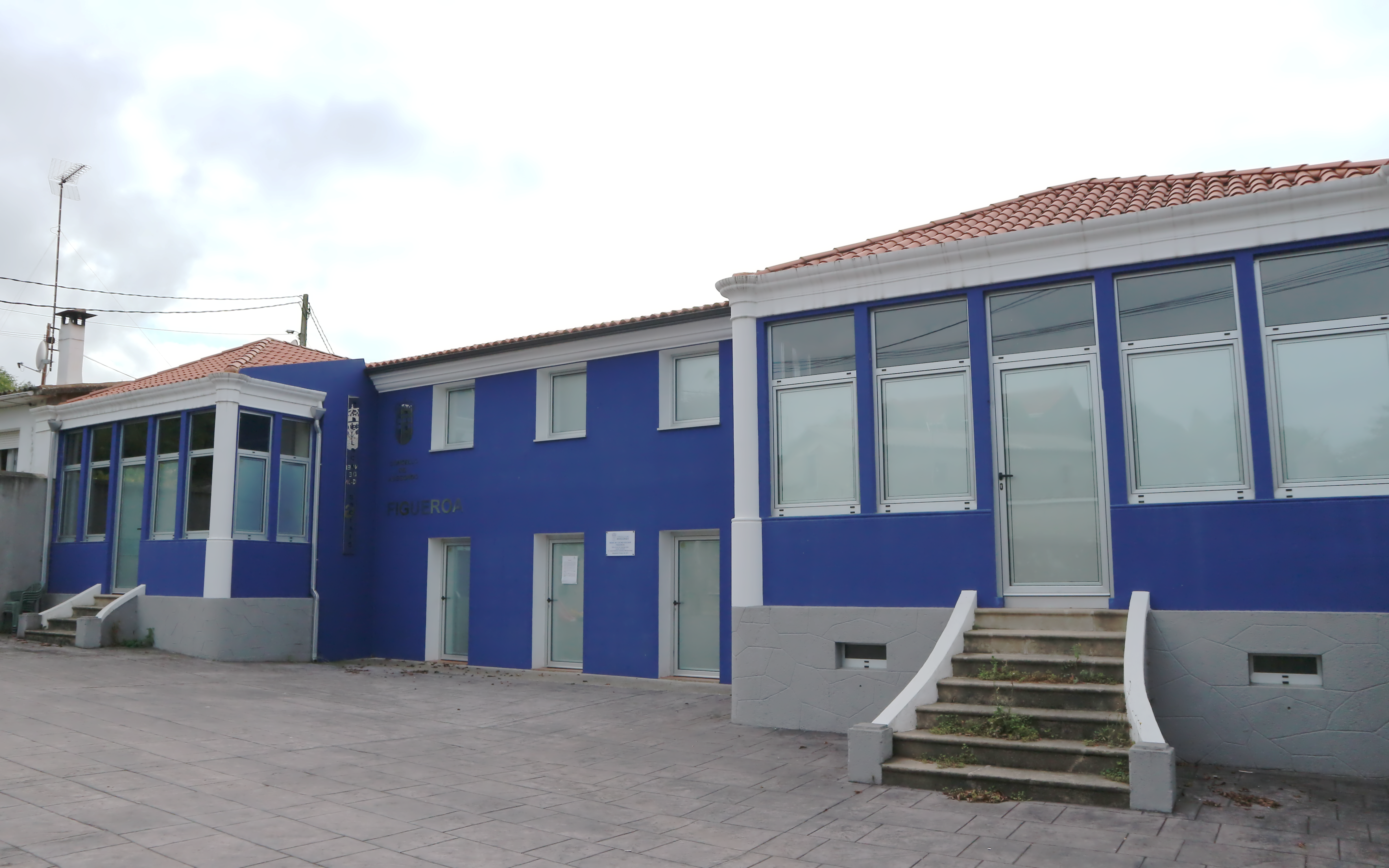 Centro Social de Figueiroa, e antiga escola da "Ave María Neno Xesús", situada en Erminde. Figueiroa, Abegondo.